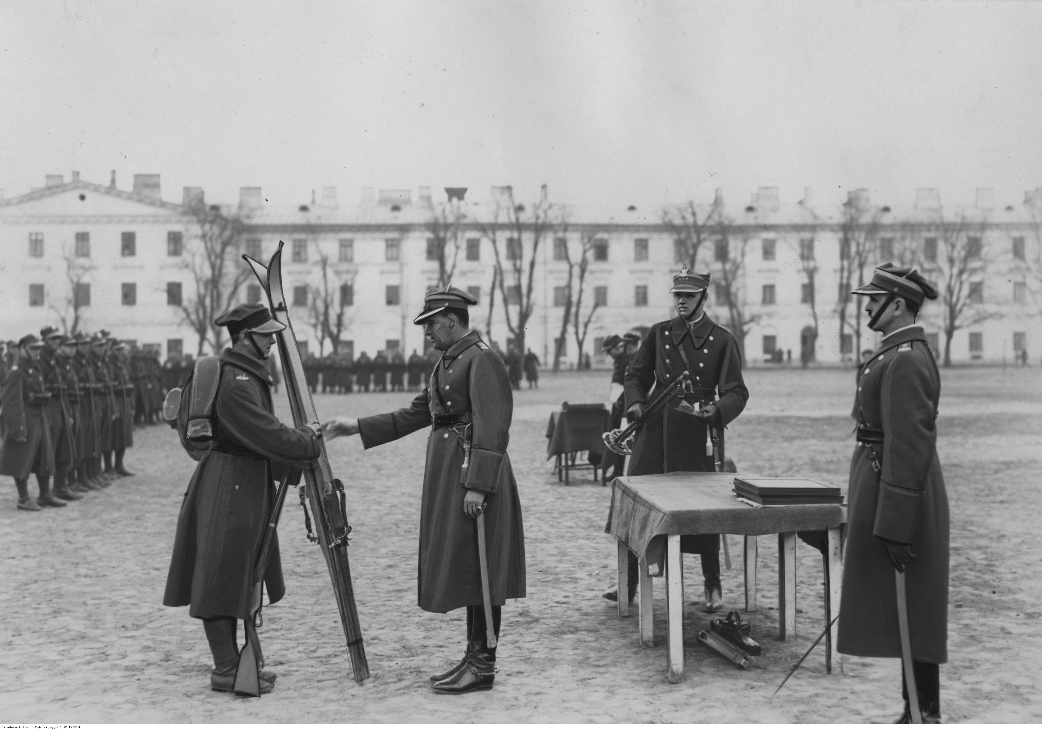 Zakończenie kursu szkoły podoficerskiej w 21 pułku piechoty w Warszawie. Dowódca 21 pułku piechoty płk Edward Dojan-Surówka wręcza prymusowi kursu nagrodę - narty. Koncern Ilustrowany Kurier Codzienny - Archiwum Ilustracji. Sygnatura: 1-W-1202-4